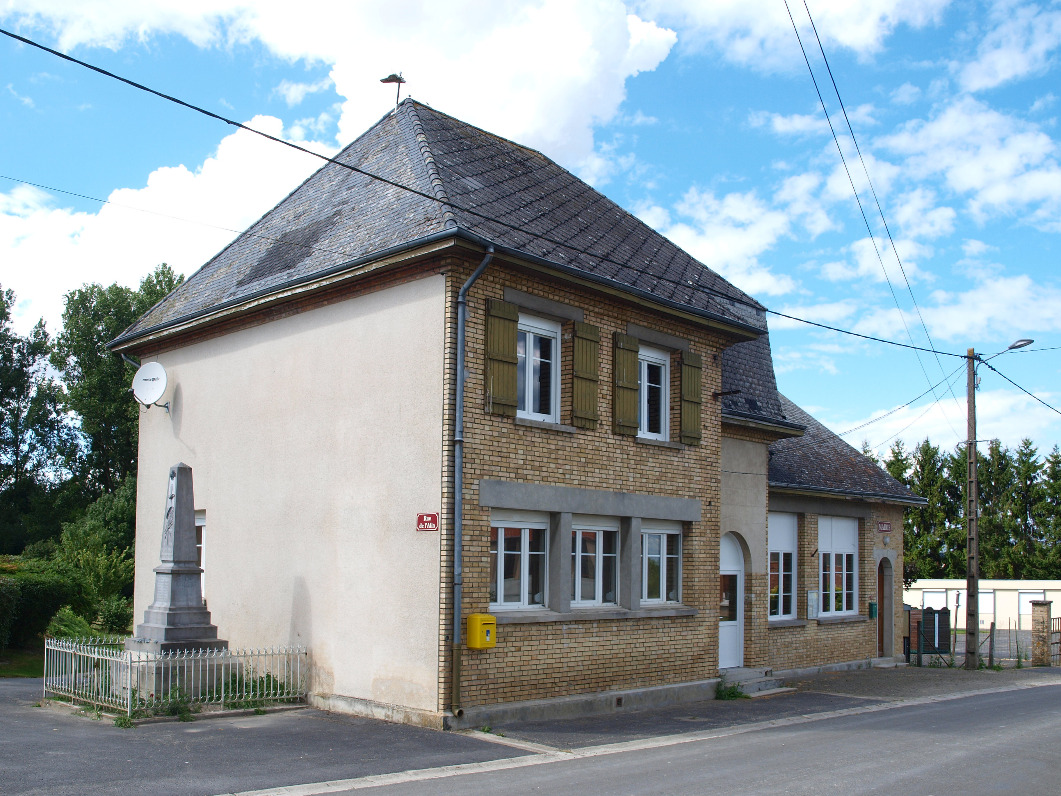 Ardeuil-et-Montfauxelles (Ardennes, France) ; mairie